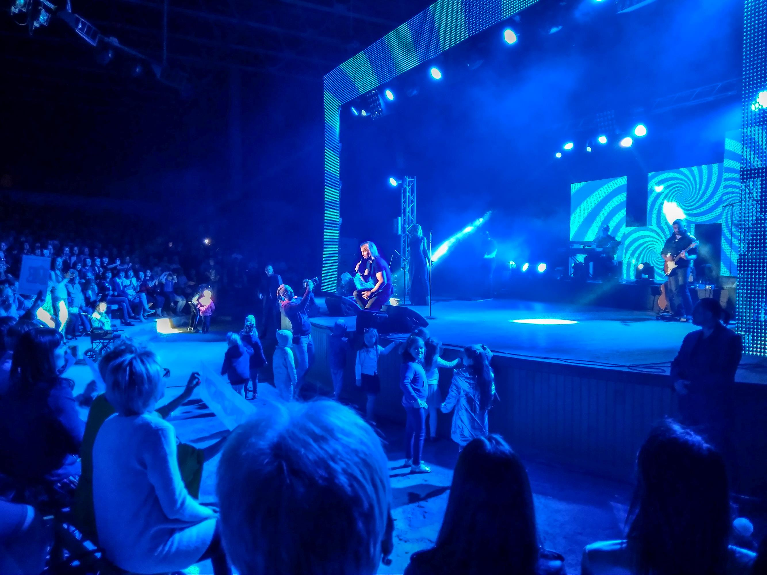 Виступ Олега Винника у Чернігові